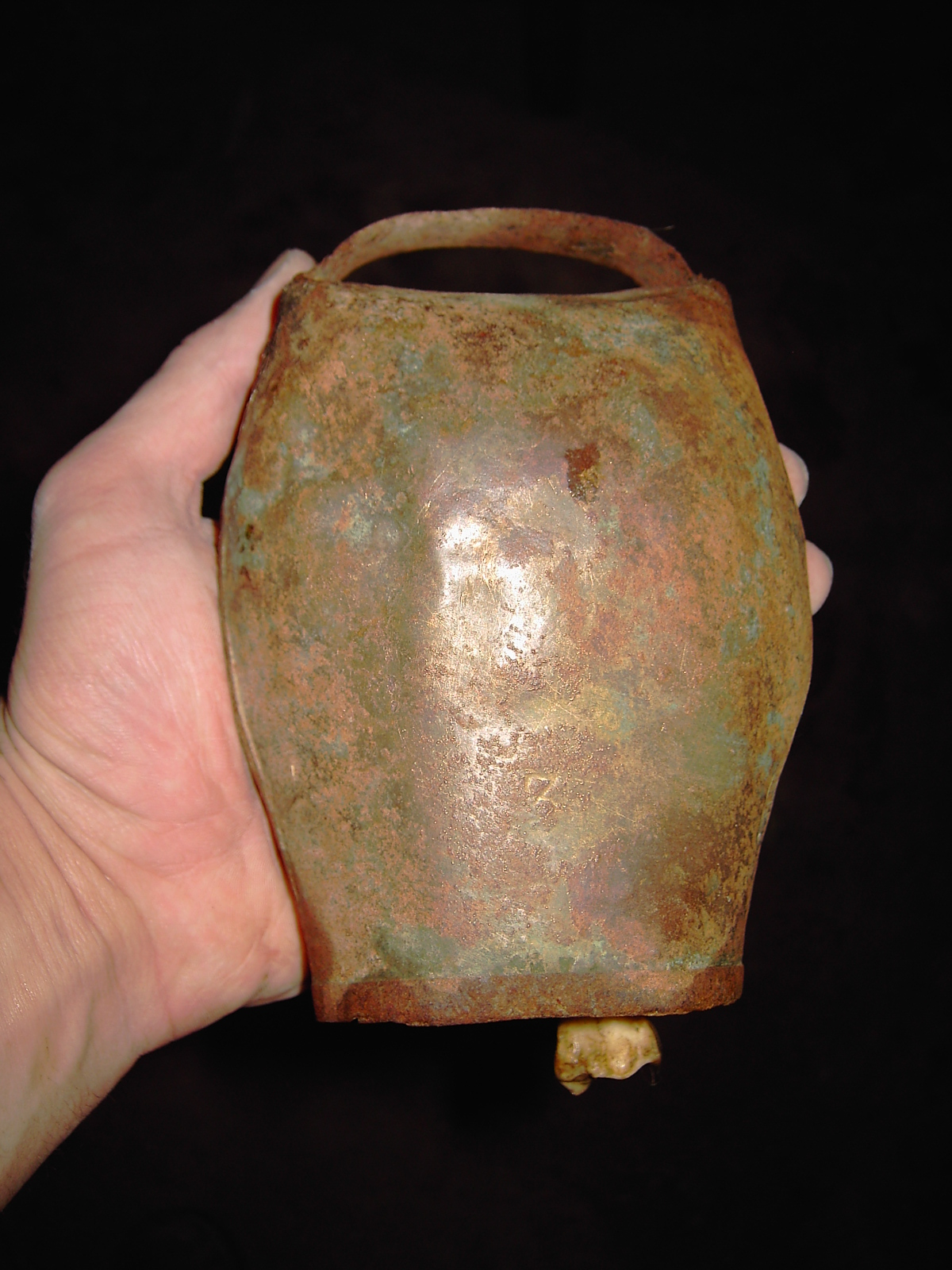 Esquilla sin canabla para oveja.